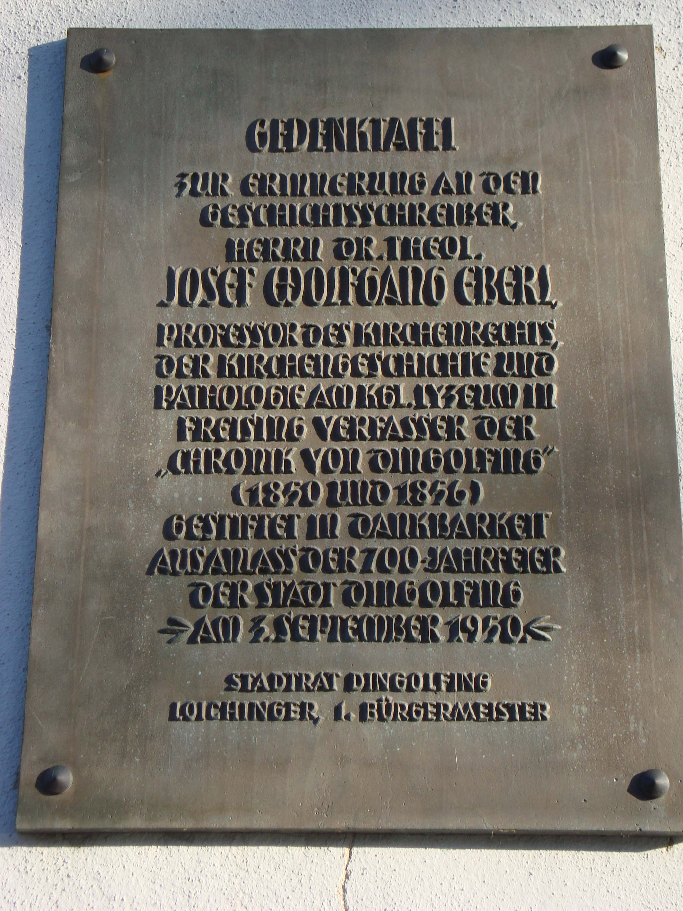 Gedenktafel für Dr. Josef Wolfgang Eberl, Theologe, angebracht 1950, Dingolfing, Obere Stadt